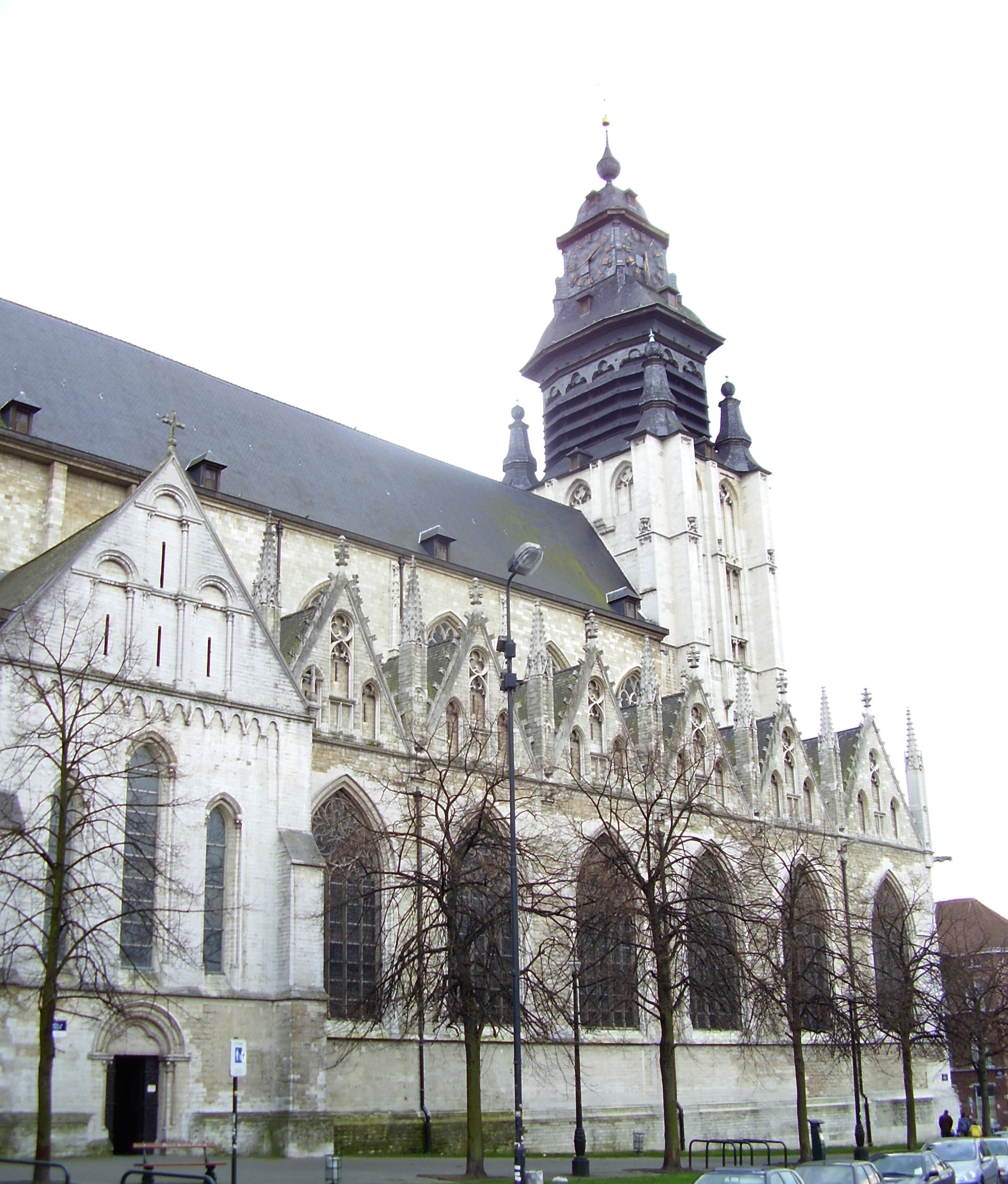 Église Notre-Dame-de-la-Chapelle, Bruxelles